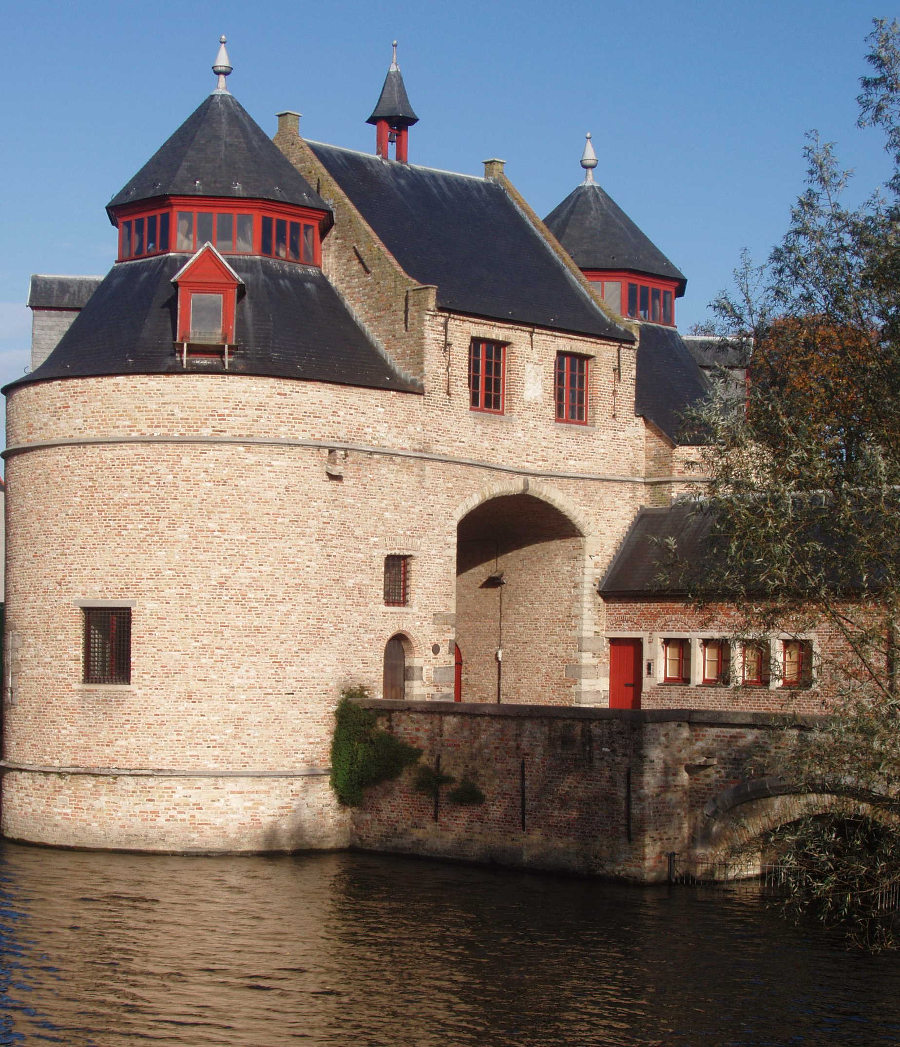 Ezelpoortin Brugge